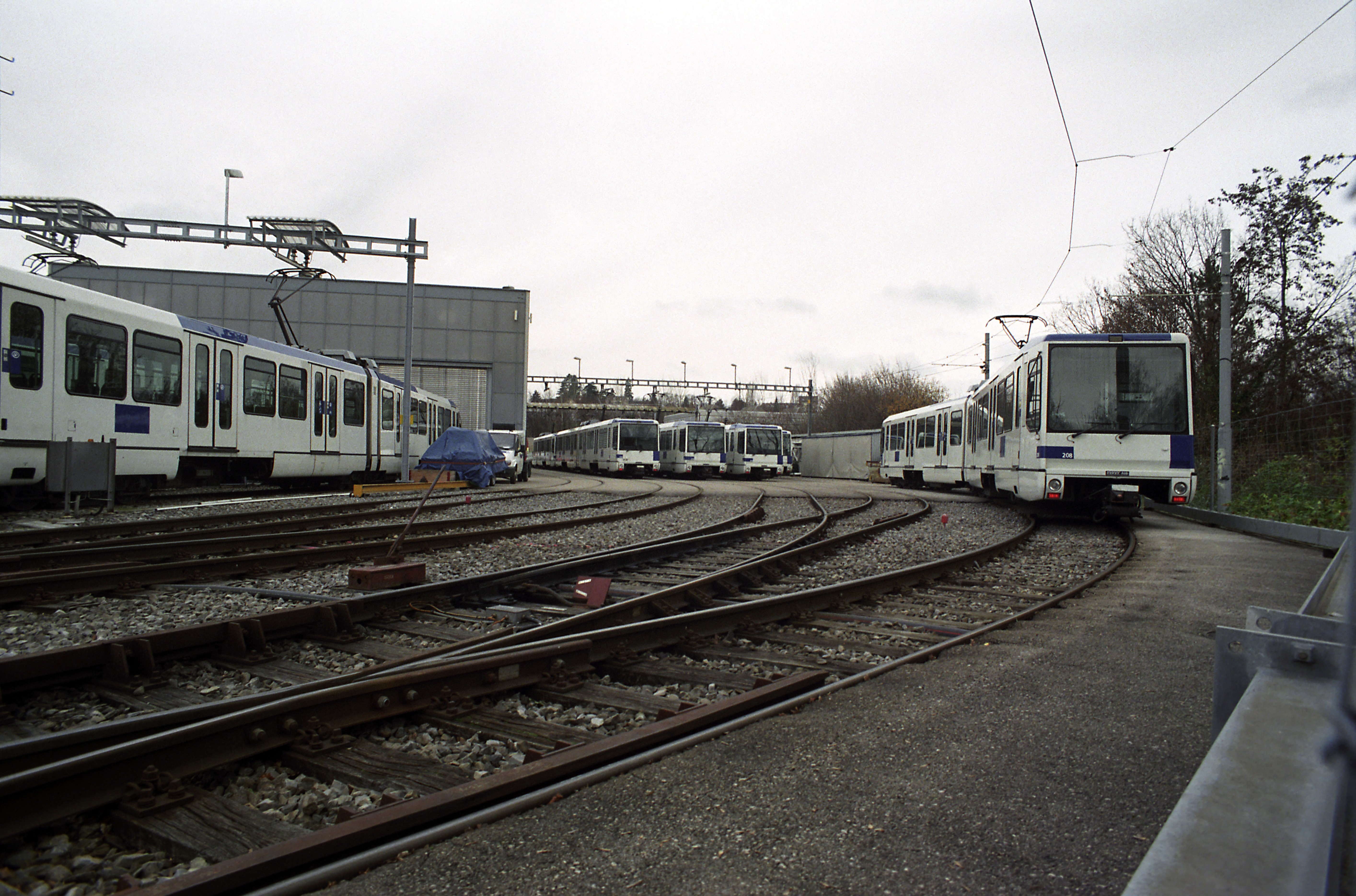 Nur das Gleis ganz rechts ist zum Aufnahmezeitpunkt mit Fahrleitung überspannt, für Rangierfahrten wird der Dieselhilfsantrieb der Bem 4/6 verwendet. An den Abstellplätzen gibt es Stromschienen für Wartungsarbeiten, den Vorbereitungsdienst und Warmhaltebetrieb.